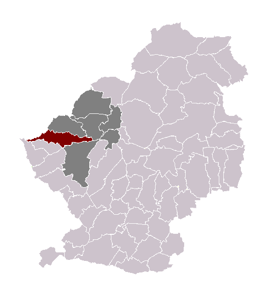 Flers-en-Escrebieux dans son canton et son arrondissement